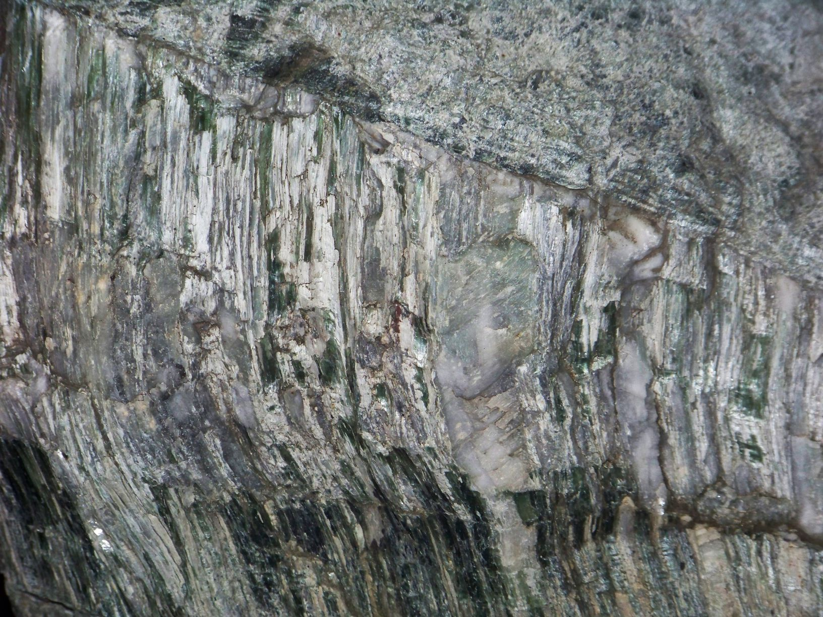 Żyła antygorytowo-kwarcowa w serpentynitach, masyw serpentynitowy Strzegom-Sobótka Sobótka, Dolny Śląsk